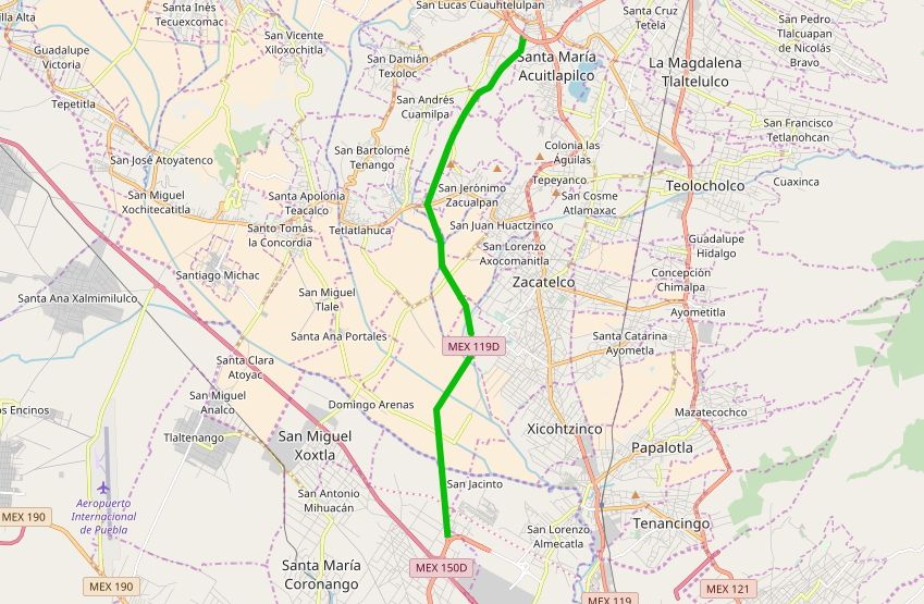 Autopista Puebla-Tlaxcala